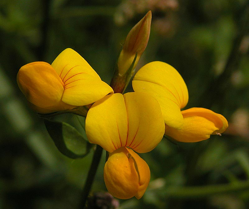 Gewöhnlicher Hornklee (lotus corniculatus), aufgenommen in Buseck